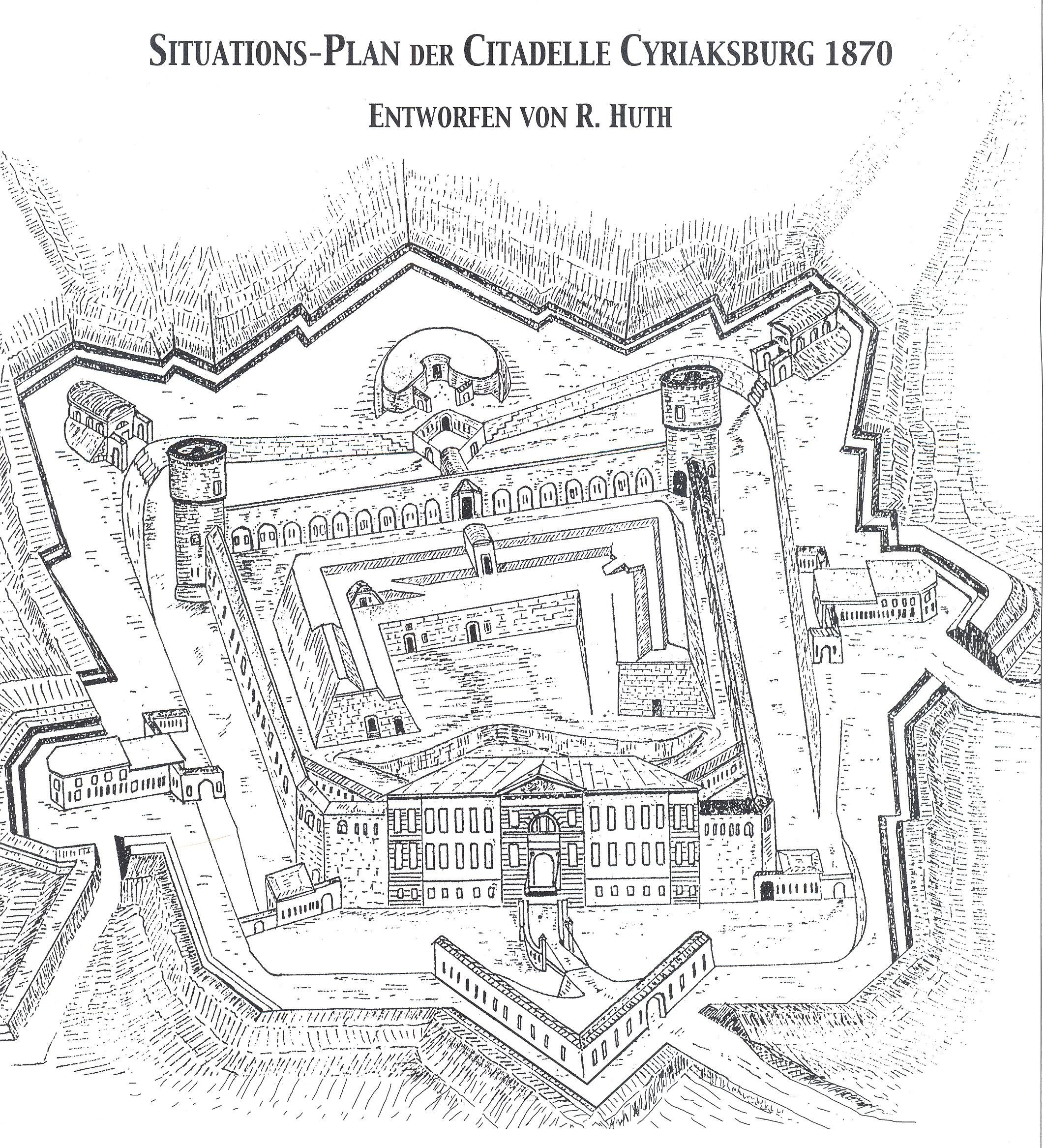 Situationsplan der Zitadelle Cyriaksburg